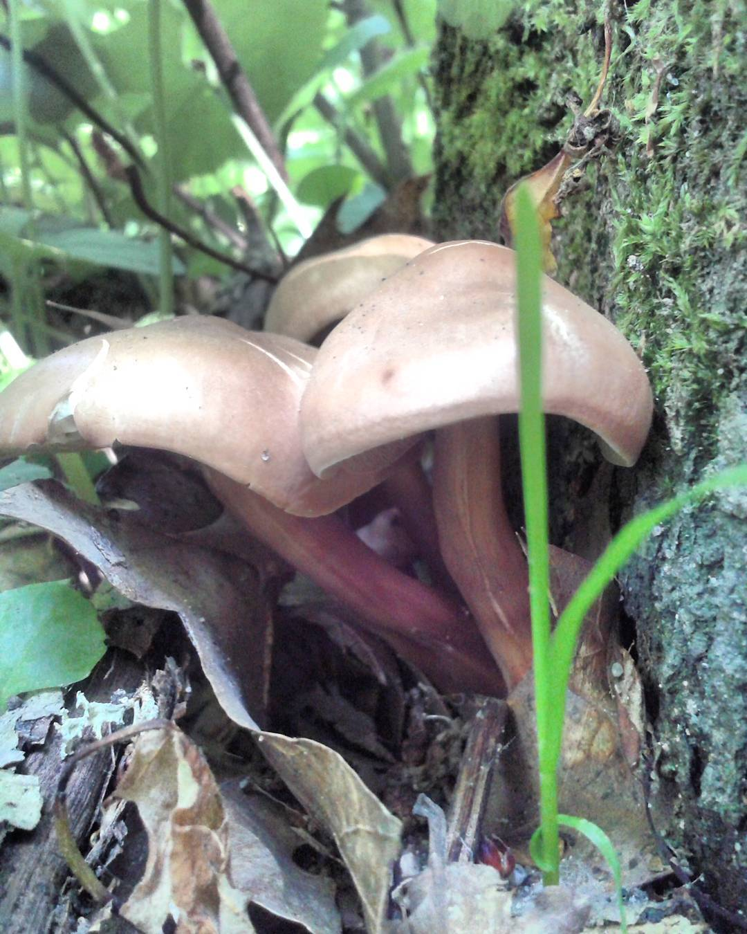 champignon